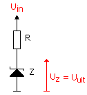 Basiswerking van een zener-diode, wordt gebruikt om de werking van een 78xx spanningsregelaar toe te lichten.